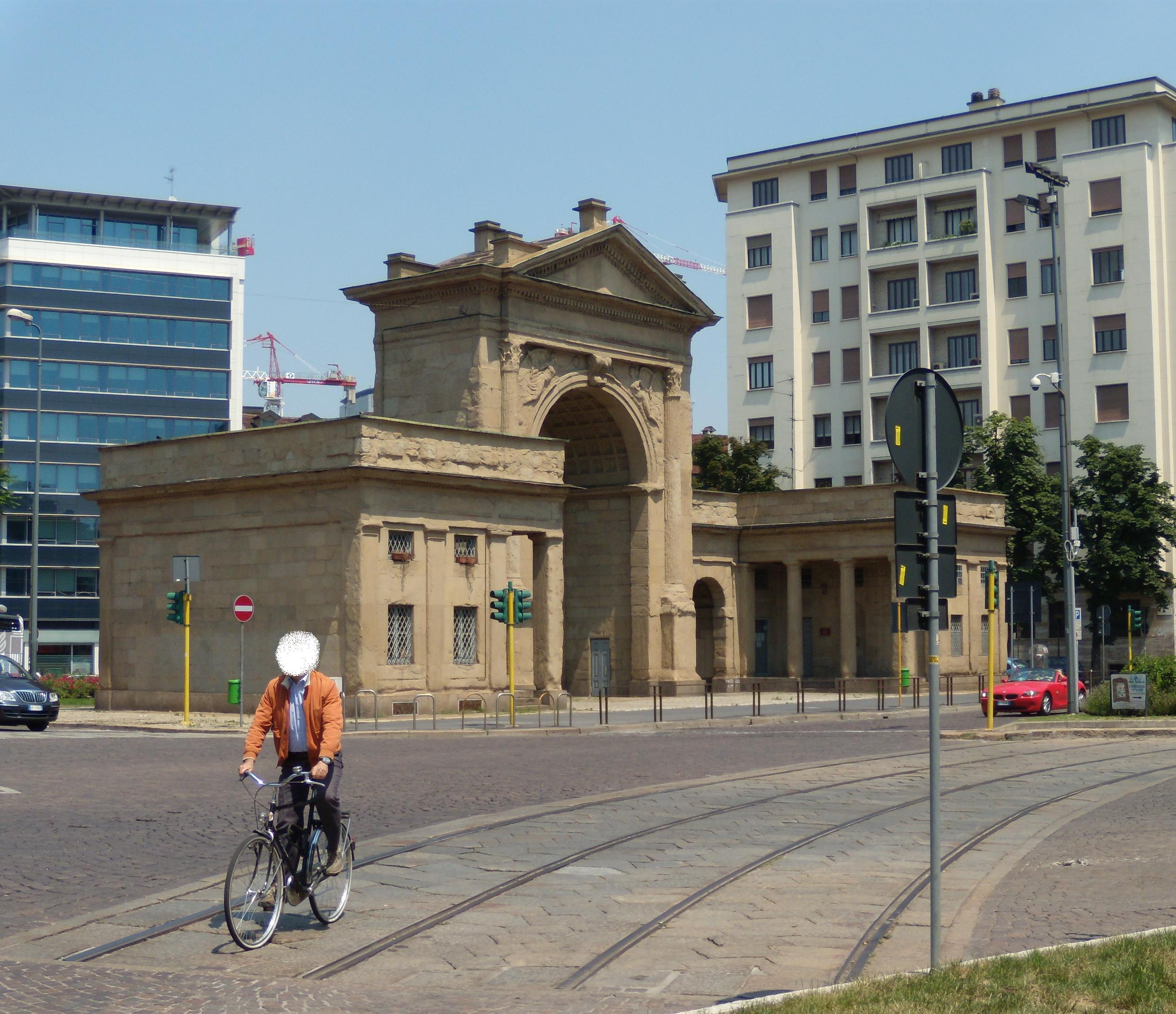 Milano, Porta Nuova